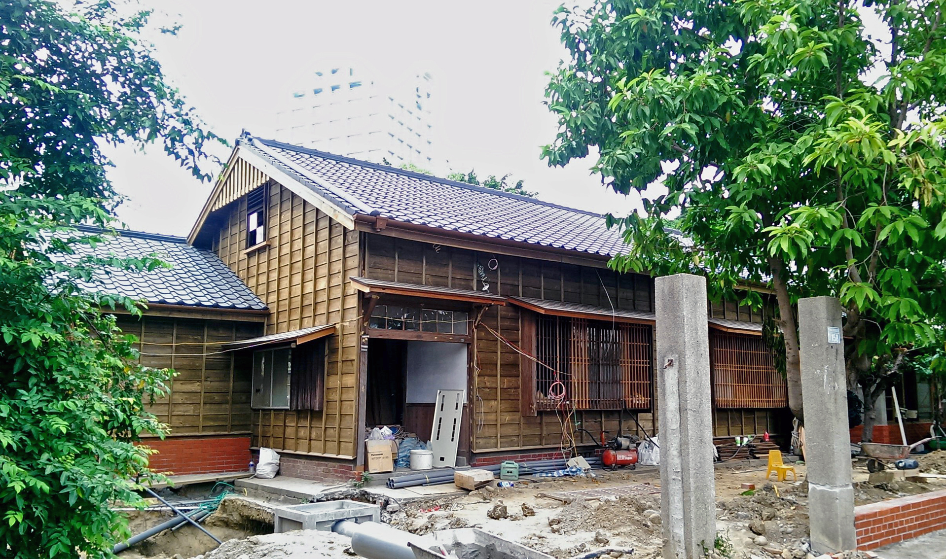 中文（台灣）: 林之助畫室修復再利用工程